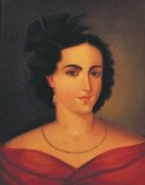 Doña María Ana Carcelén de Guevara y Larrea-Zurbano, VII Marquesa de Solanda y VI de Villarocha, II Gran Mariscala de Ayacucho, esposa del prócer independentista Antonio José de Sucre.